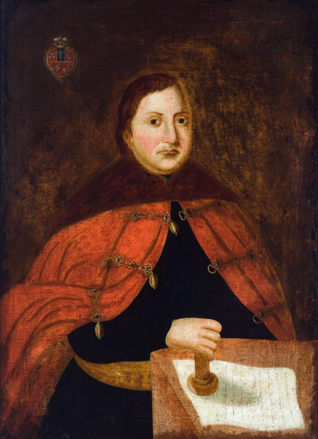 Беларуская (тарашкевіца): Партрэт Казімера Льва Сапегі (Kazimier Leŭ Sapieha)